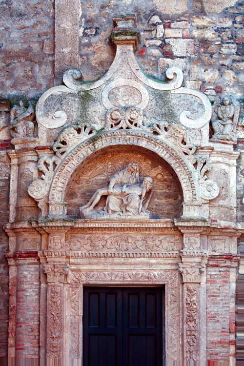 Miglionico - Chiesa Madre - Entrata secondaria con la PietÃ sull'arcata